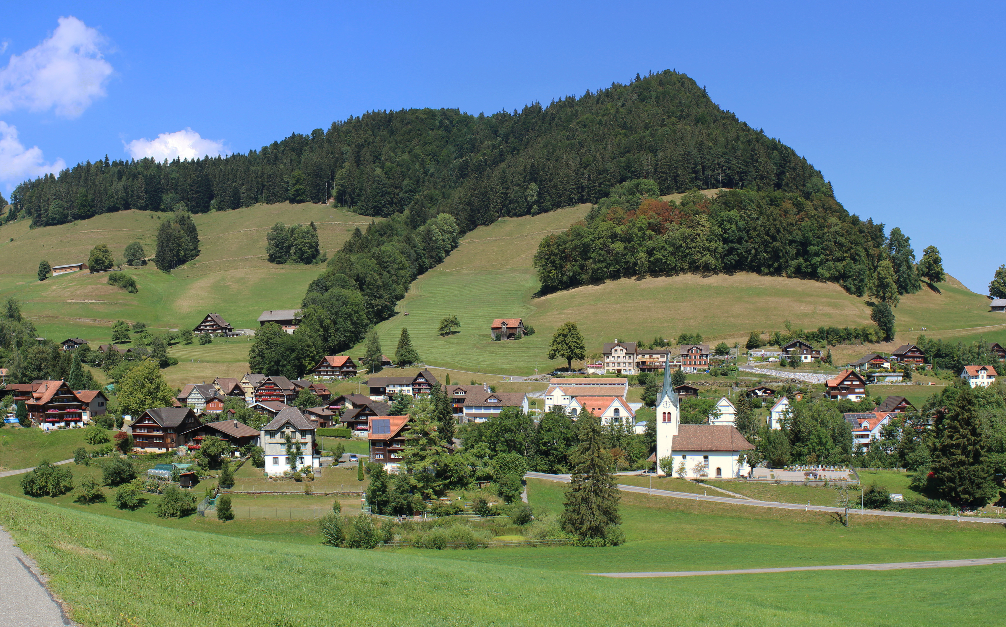 Krinau, Schweiz aus Richtung Süden